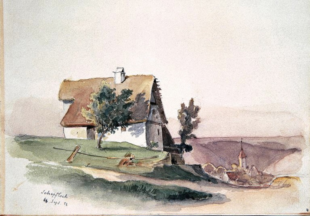 Schopfloch, Blick über freistehendes Haus auf Schopfloch (Lavierte Zeichnung)